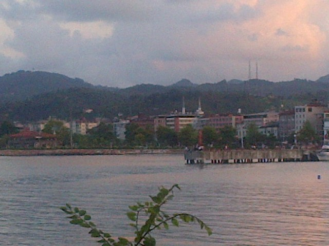 Una vista marina de Ünye.